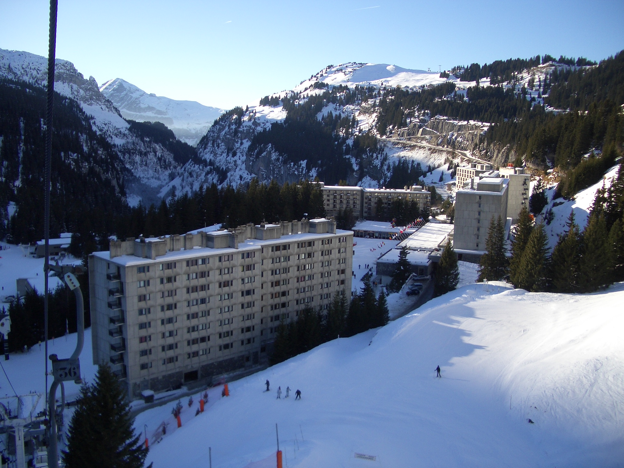 IMGP0108IMGP0108